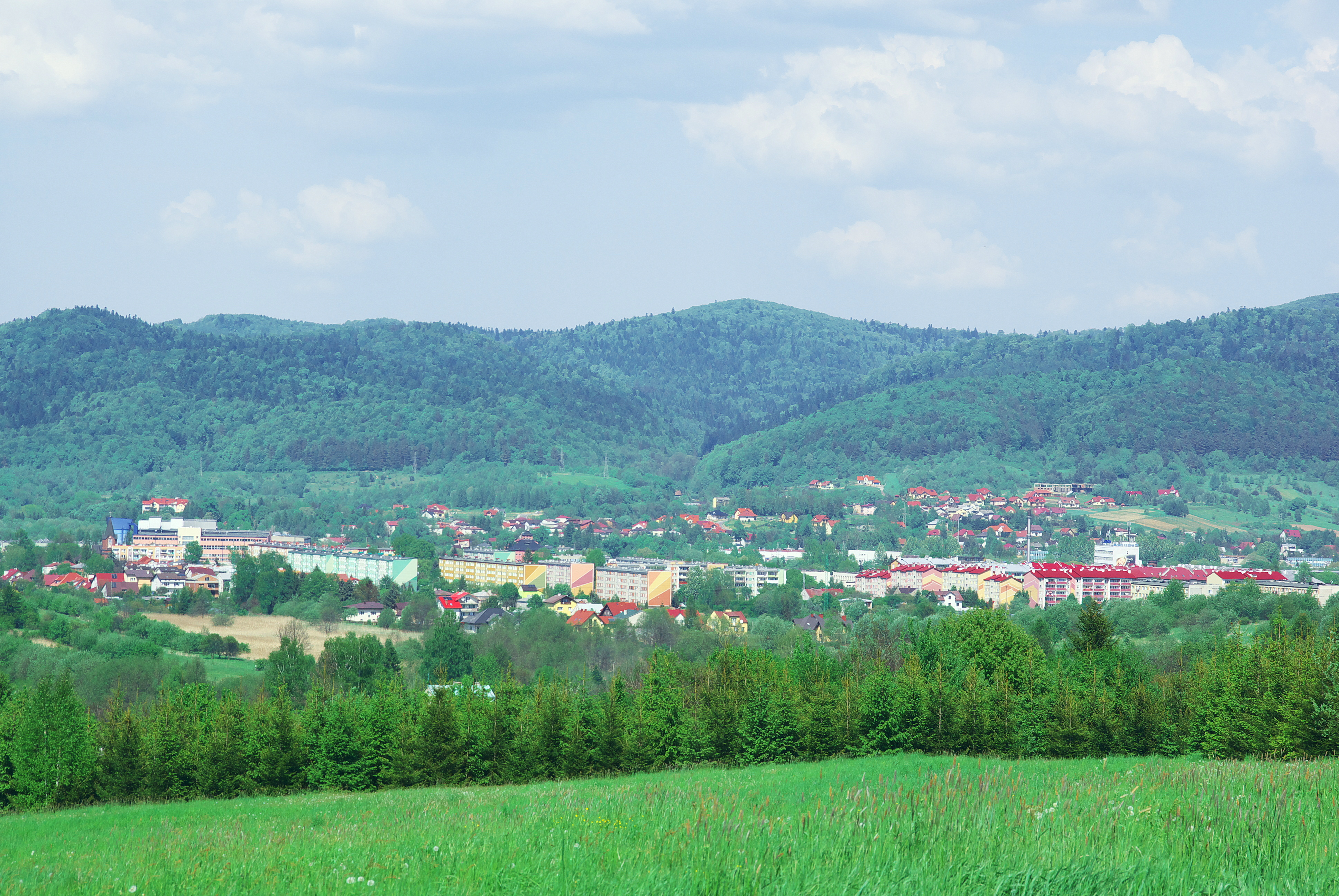 Posada Sanok panorama view from Stróże Małe